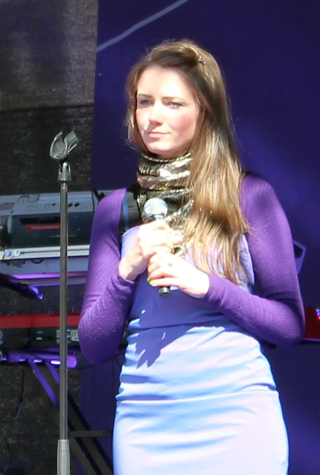 Elerin Velling esinemas ansambli Mantra Gora koosseisus Tallinnas Raekoja platsil 13. mail 2012.